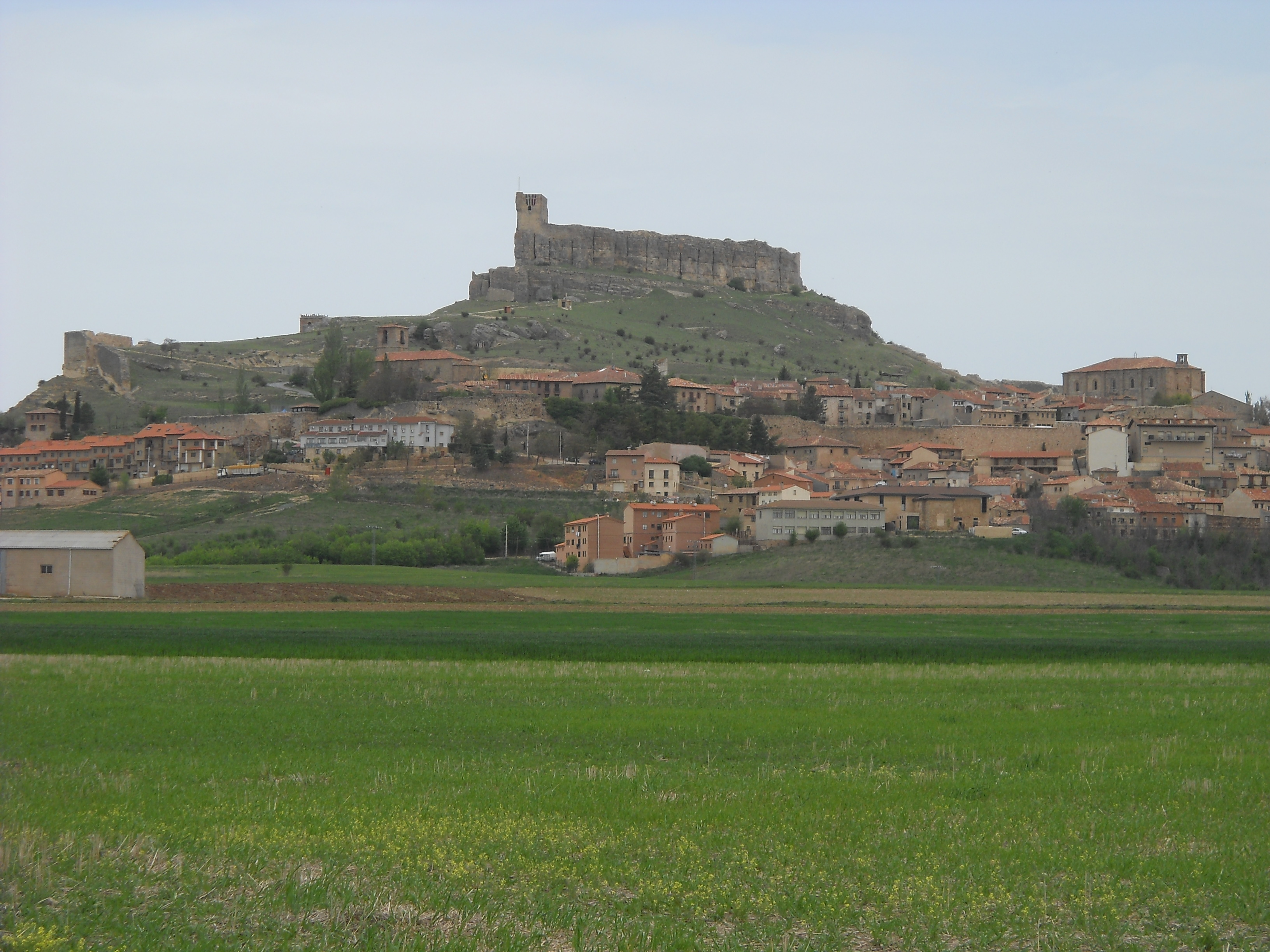 Panorama de Atienza, Guadalajara, España